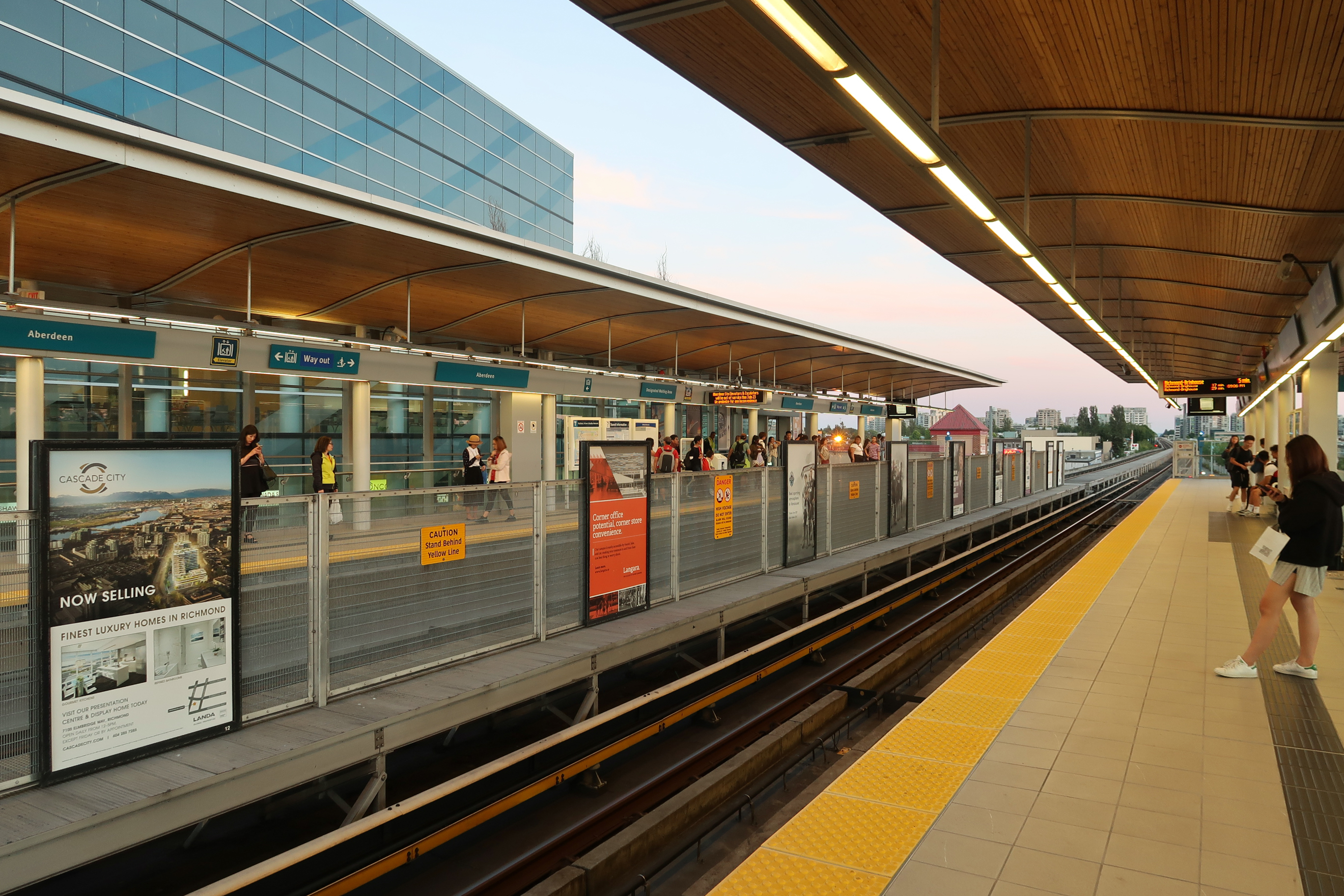 Aberdeen Station platform